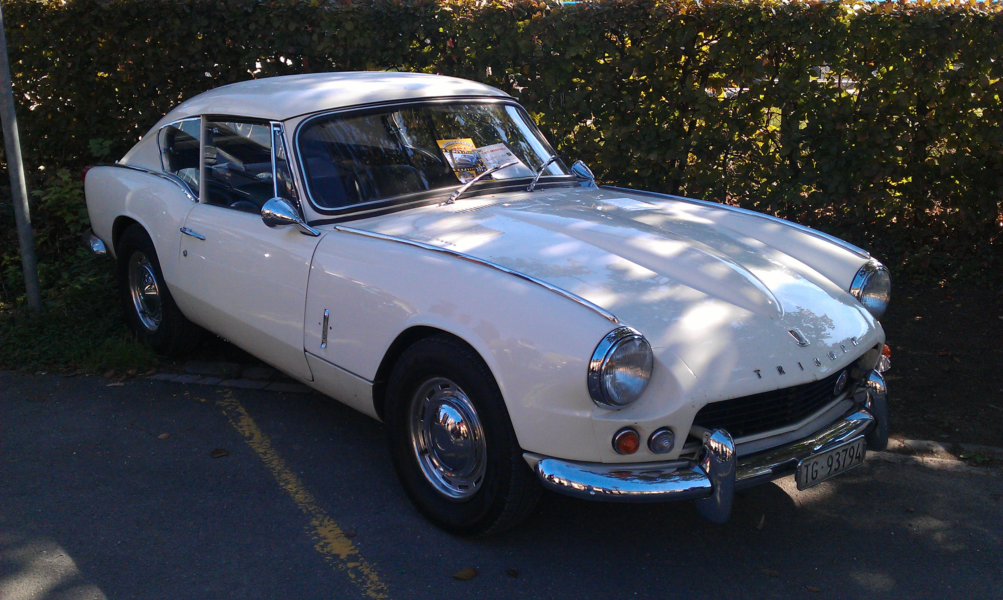 Triumph GT6 Mk1